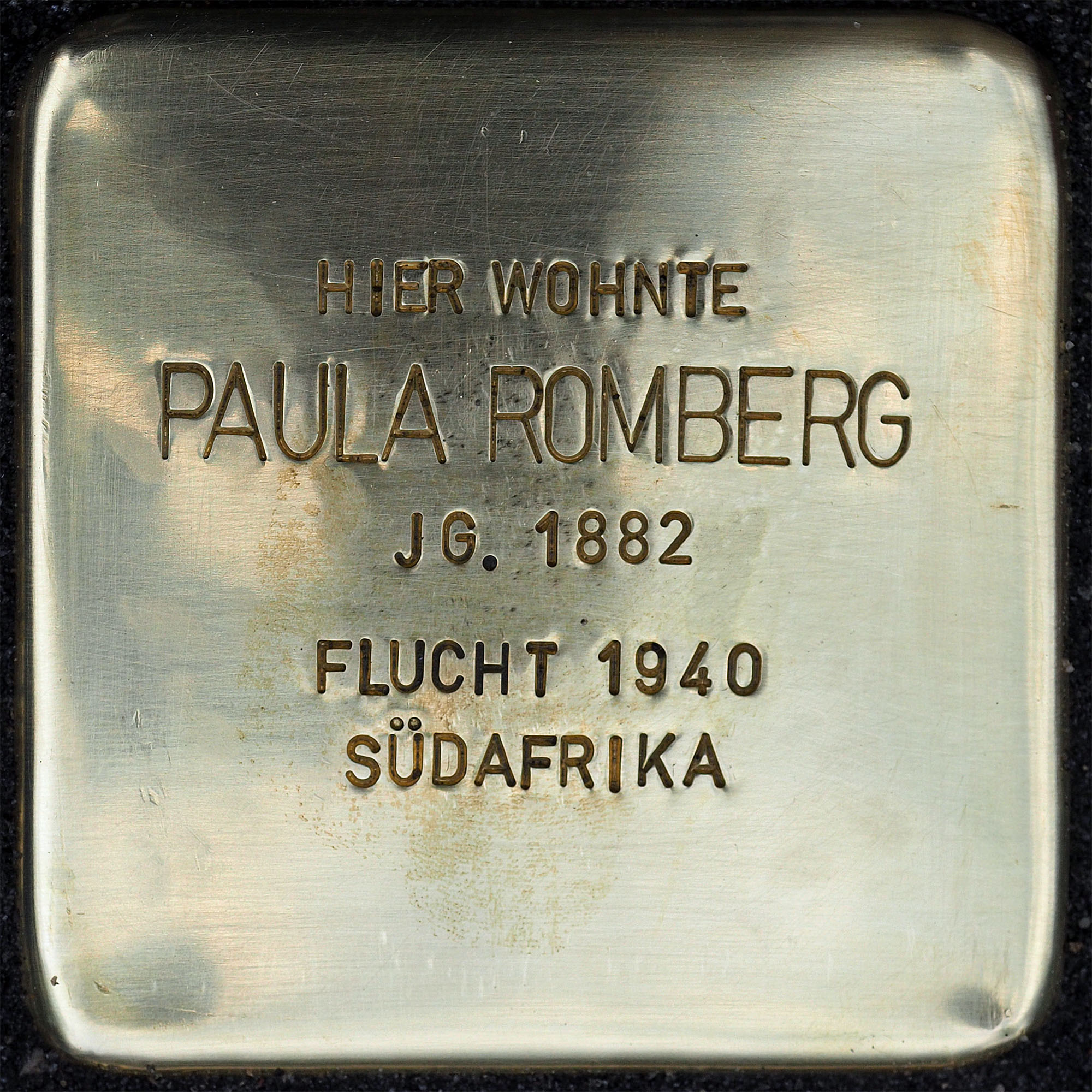 Stolpersteine in Tönisvorst: Paula Romberg